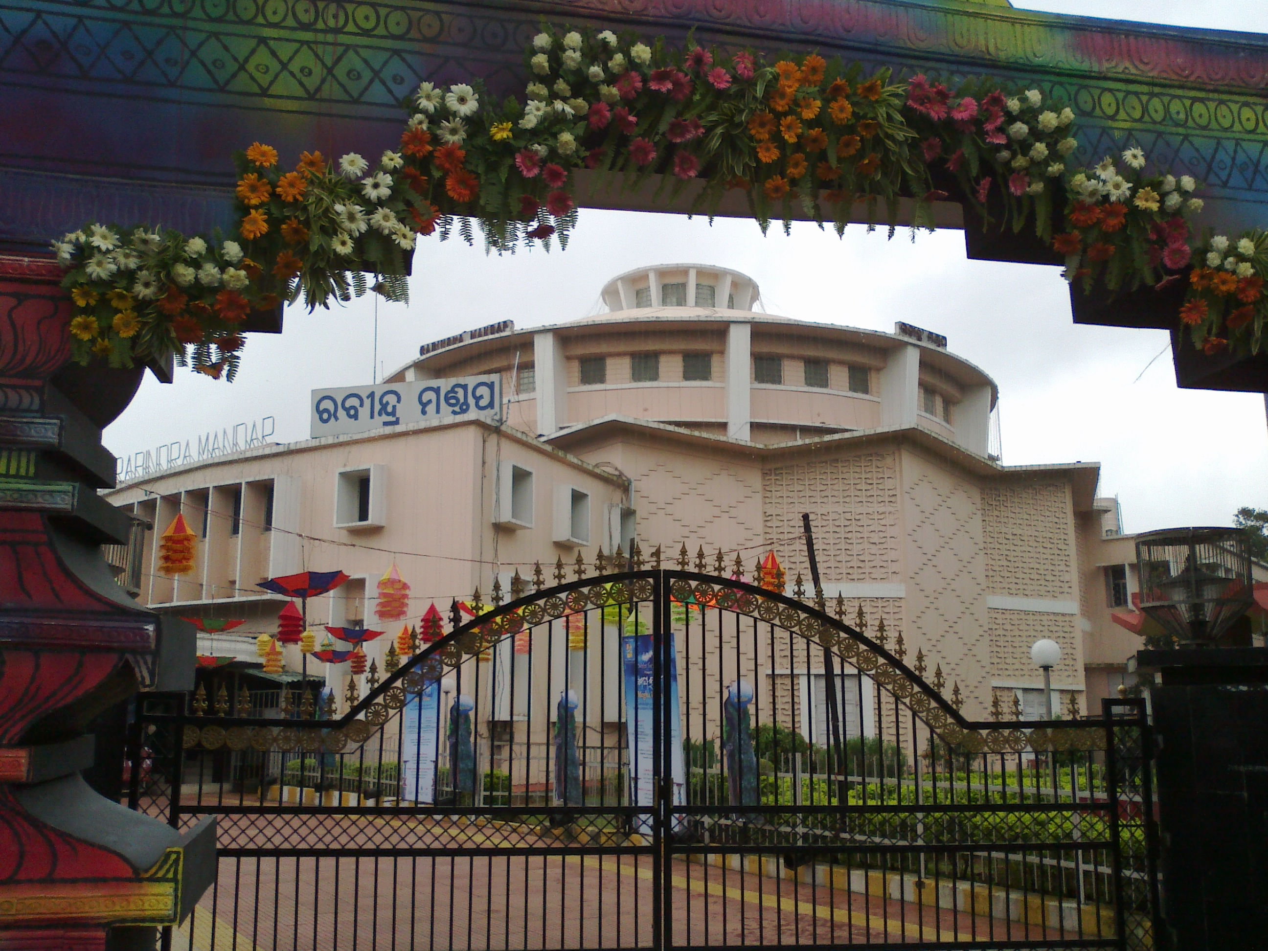 ଓଡ଼ିଆ: ରବିନ୍ଦ୍ର ମଣ୍ଡପ